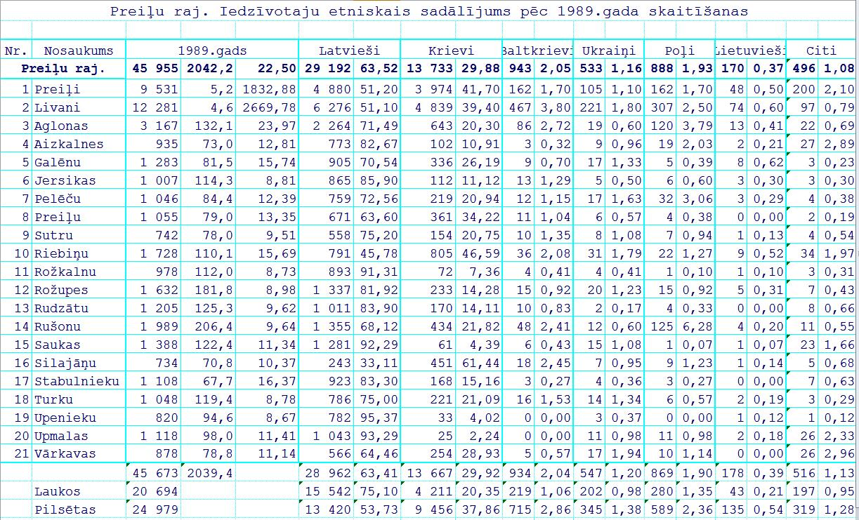 Этнический состав населения Латвии по переписи 1989 года